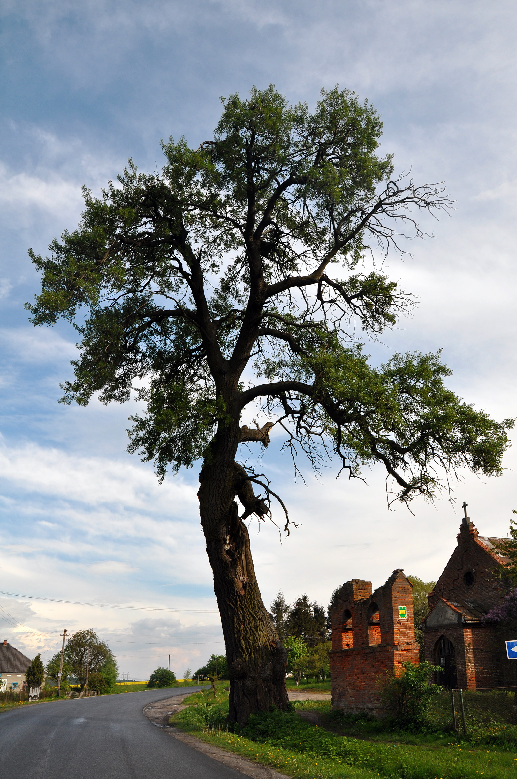 Тополя-патріарх, Жидачівський район, с. Репехів